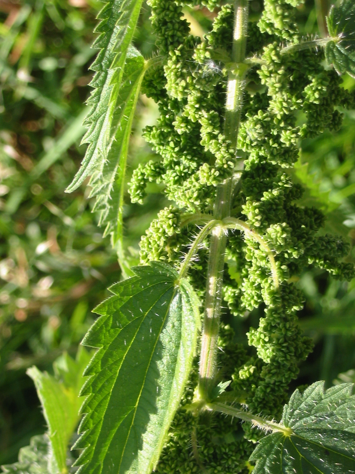 Urtica dioica, near Bruges, Belgium